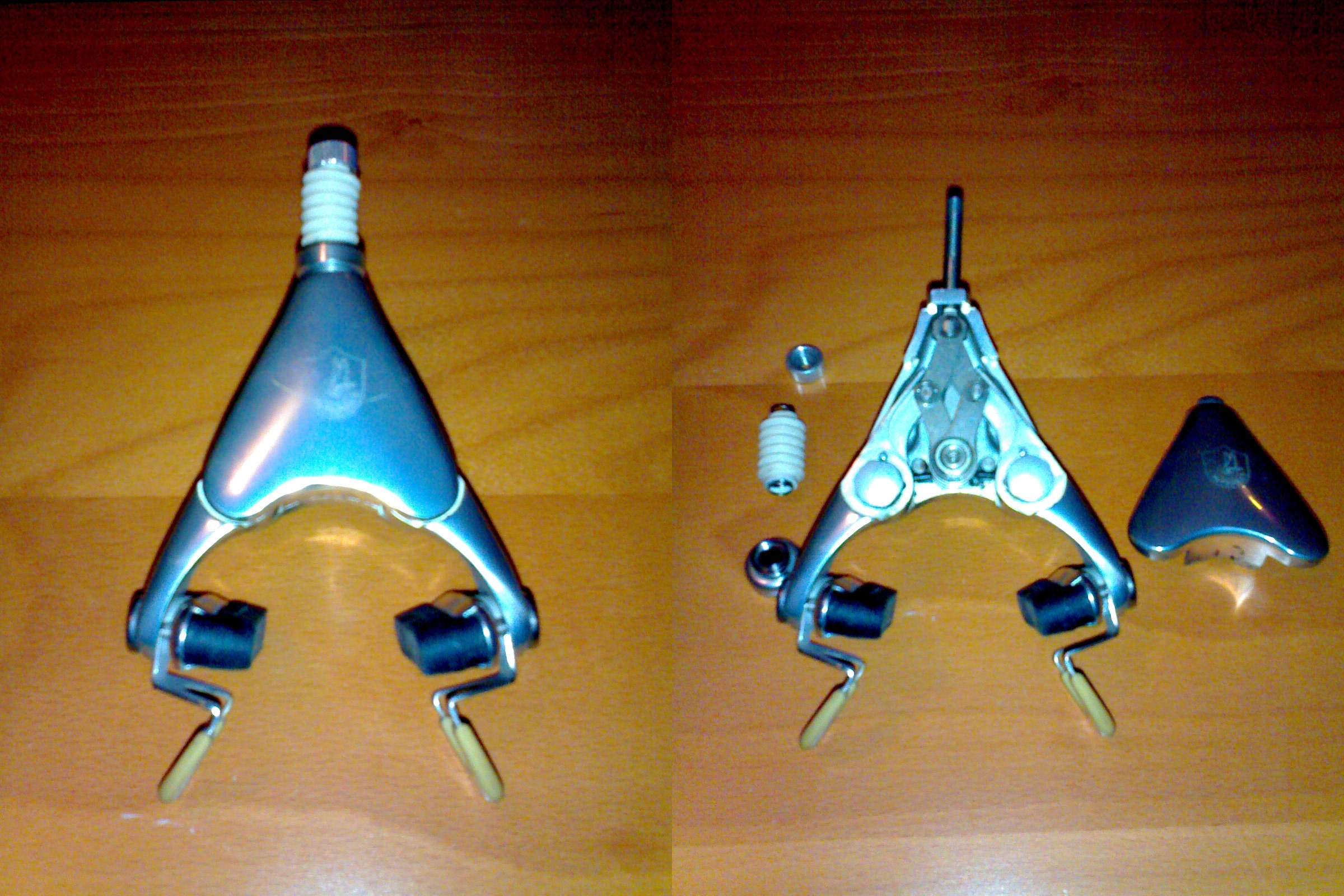 Beschreibung: Campagnolo Delta Bremszange Front und Innenansicht Quelle: Selbst erstellt Datum: 12. Januar 2007 Autor: Christian Kunze